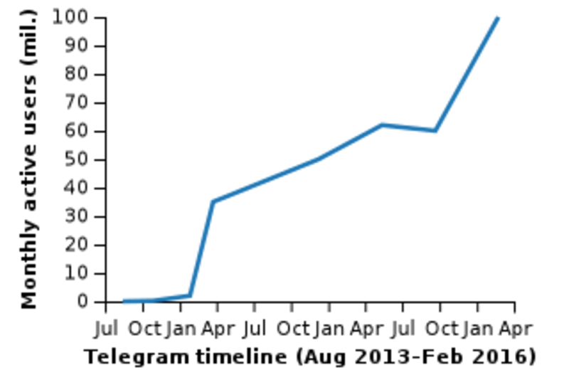 میزان استفاده تلگرام از اوت 2013 تا فوریه 2016